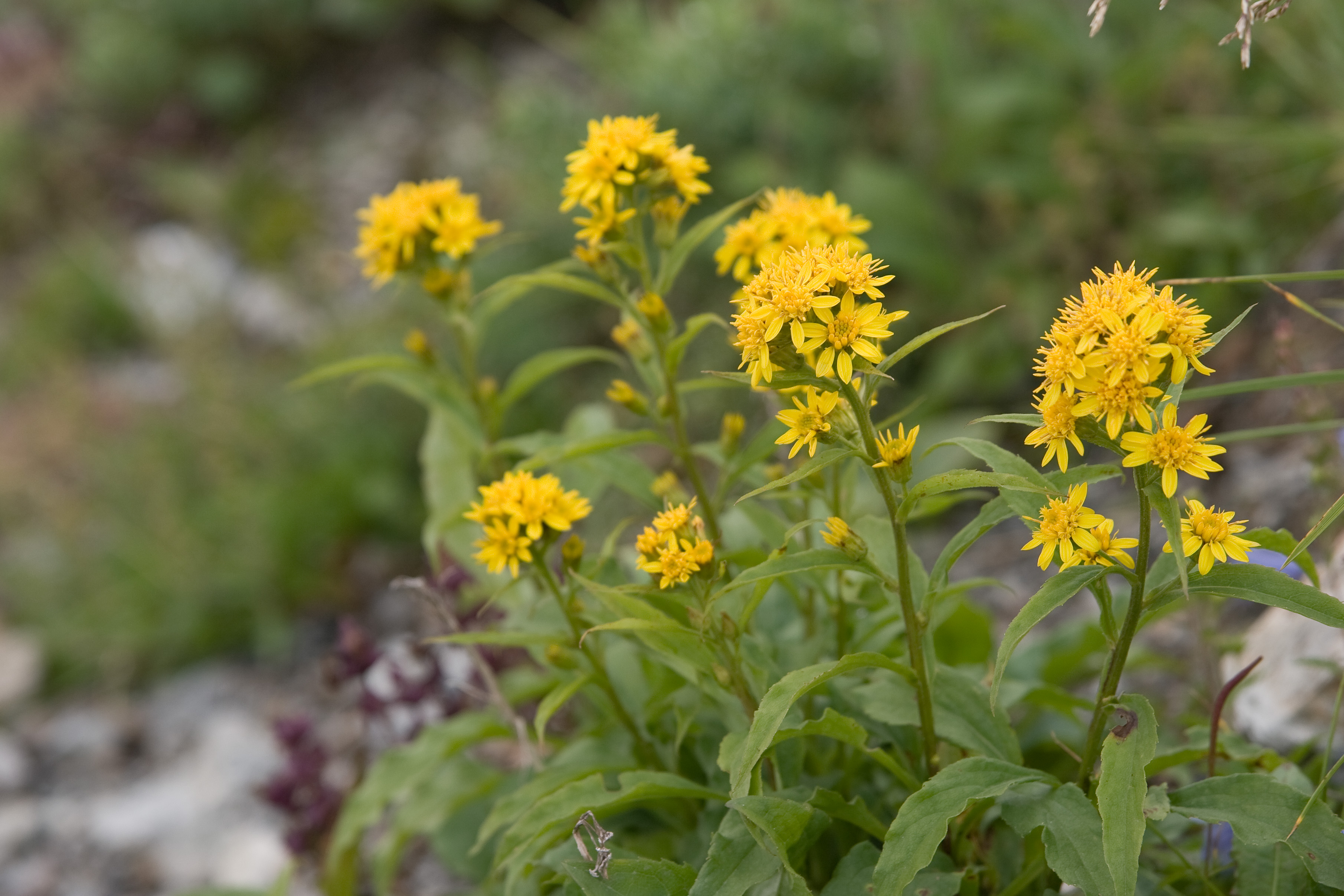 ミヤマアキノキリンソウ (学名:Solidago virgaurea var. leiocarpa)